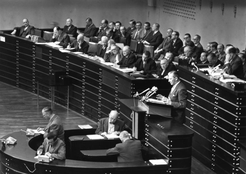 1. Lesung der Pariser Verträge im Deutschen Bundestag am 16. Dezember 1954 im Bild: Der CDU-Abgeordnete Kurt Georg Kiesinger spricht.